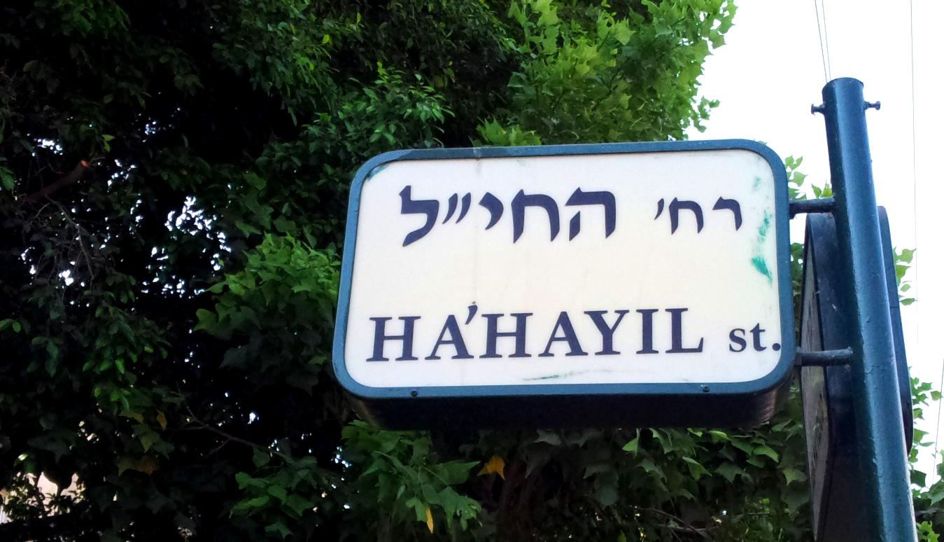 רחוב על שם החי"ל (ראשי תיבות: חטיבה יהודית לוחמת) ברעננה